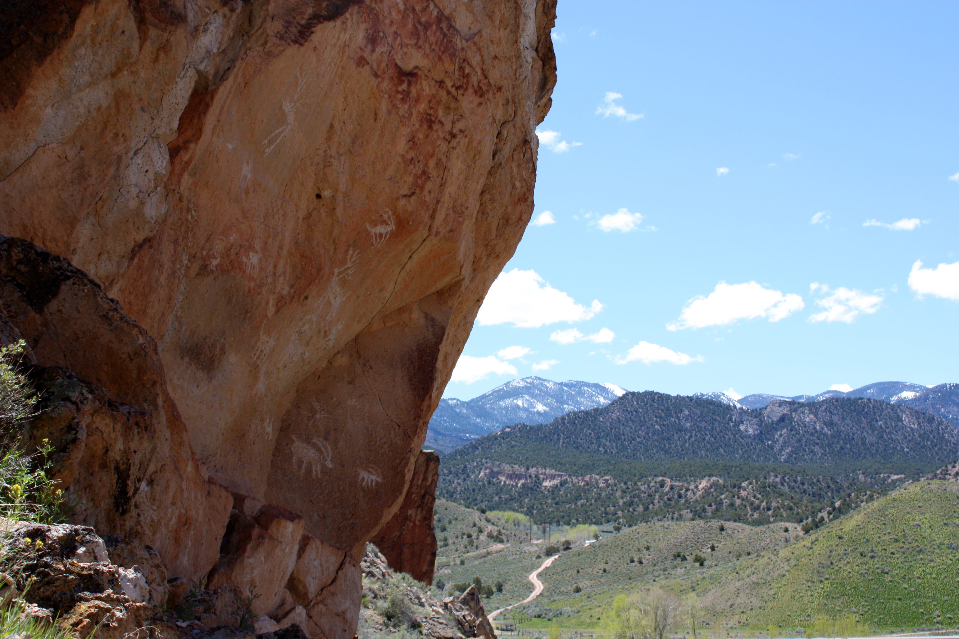 A Hunting Panel